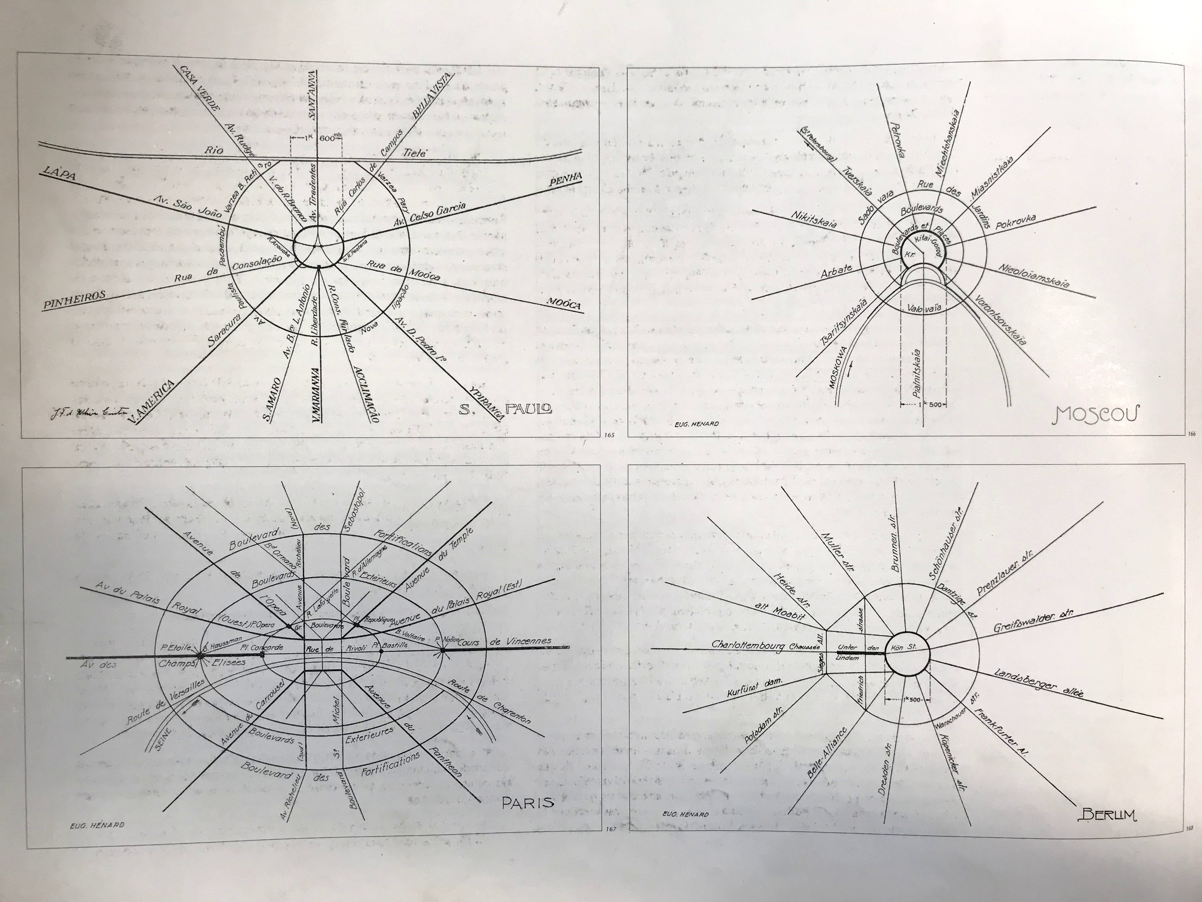 IMAGEM 2